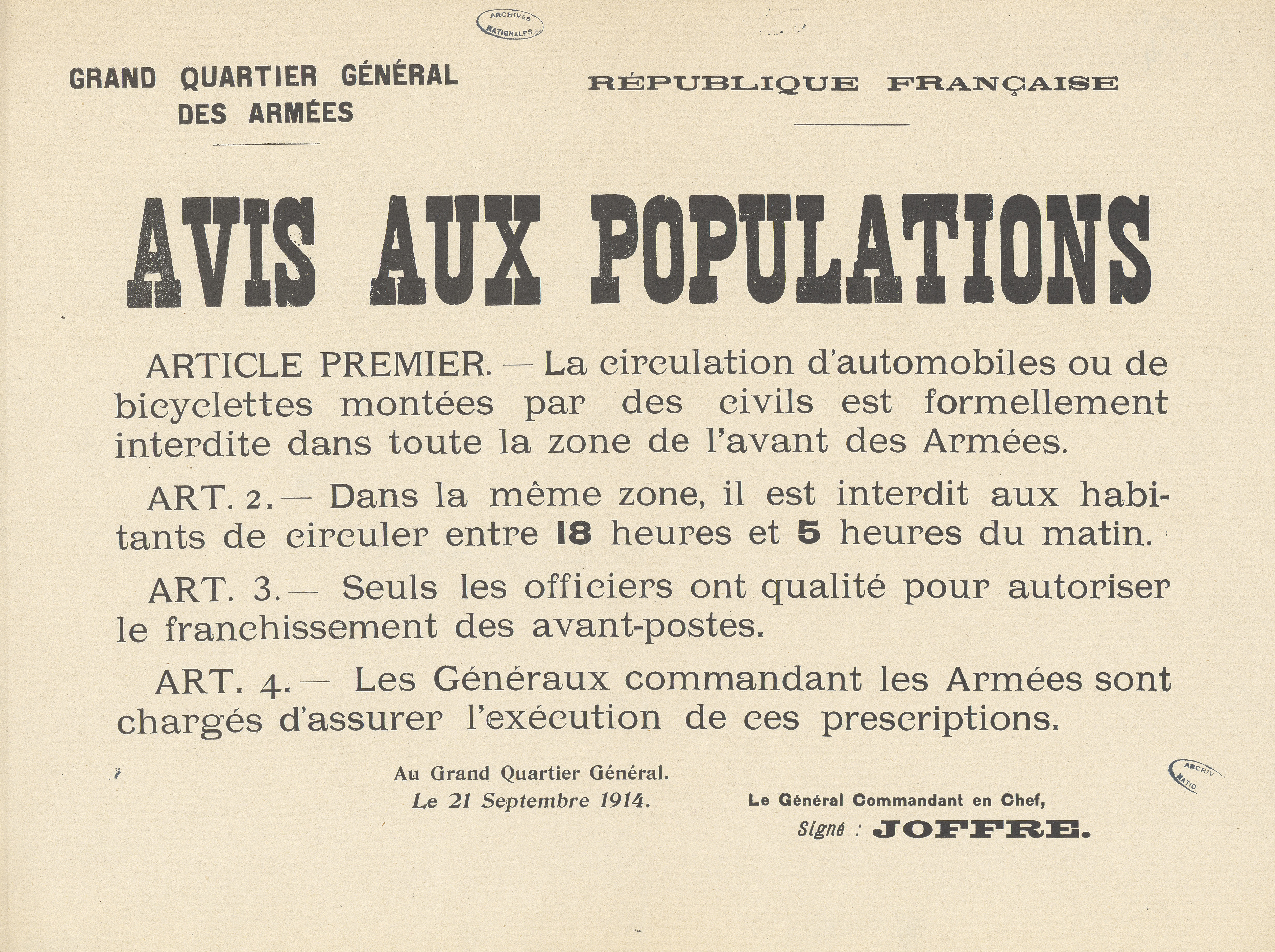 Affiche République française. Grand quartier général des Armées. Avis aux populations. [Interdiction aux civils de circuler entre 18h et 5h du Matin]